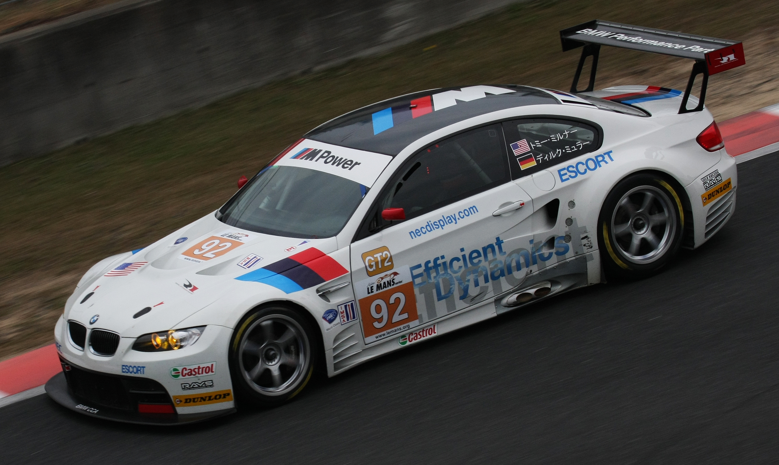 Asian Le Mans Series 2009 1000km of Okayama: BMW M3 GT2 (BMW Rahal Letterman Racing)